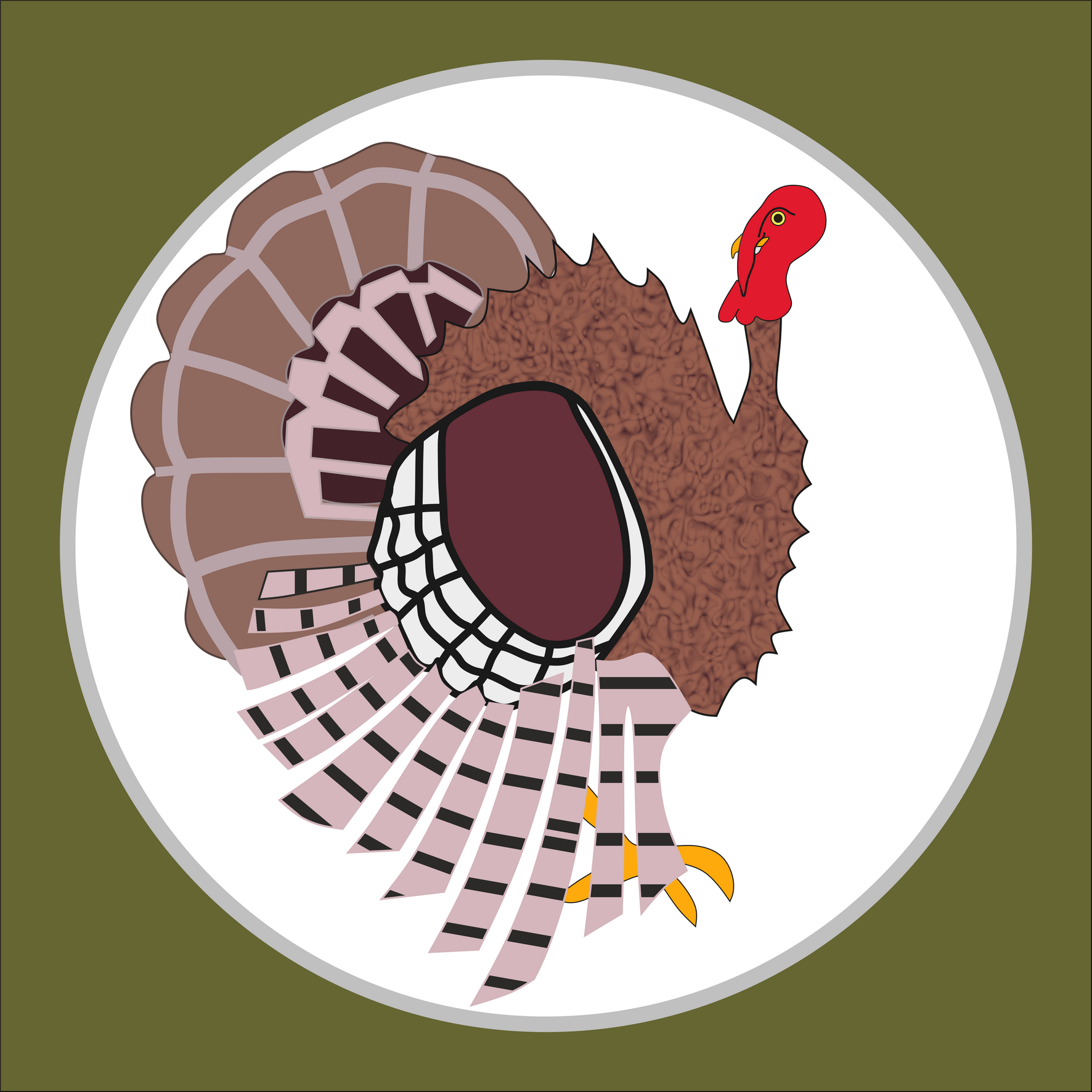 Znak malowany na samolotach 161 eskadry myśliwskiej, stosowany w latach 1927 - 1932